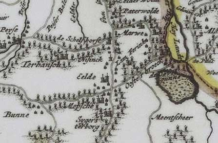 fragment van een kaart van Frederik de Wit van Groningen en Ommelanden